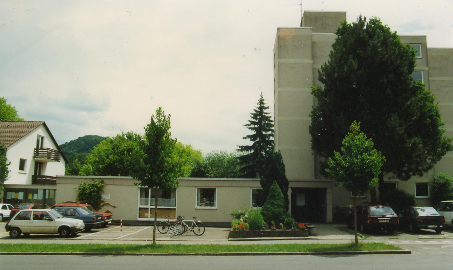 Eingangsbereich der Evangelischen Fachhochschule für Sozialwesen Reutlingen